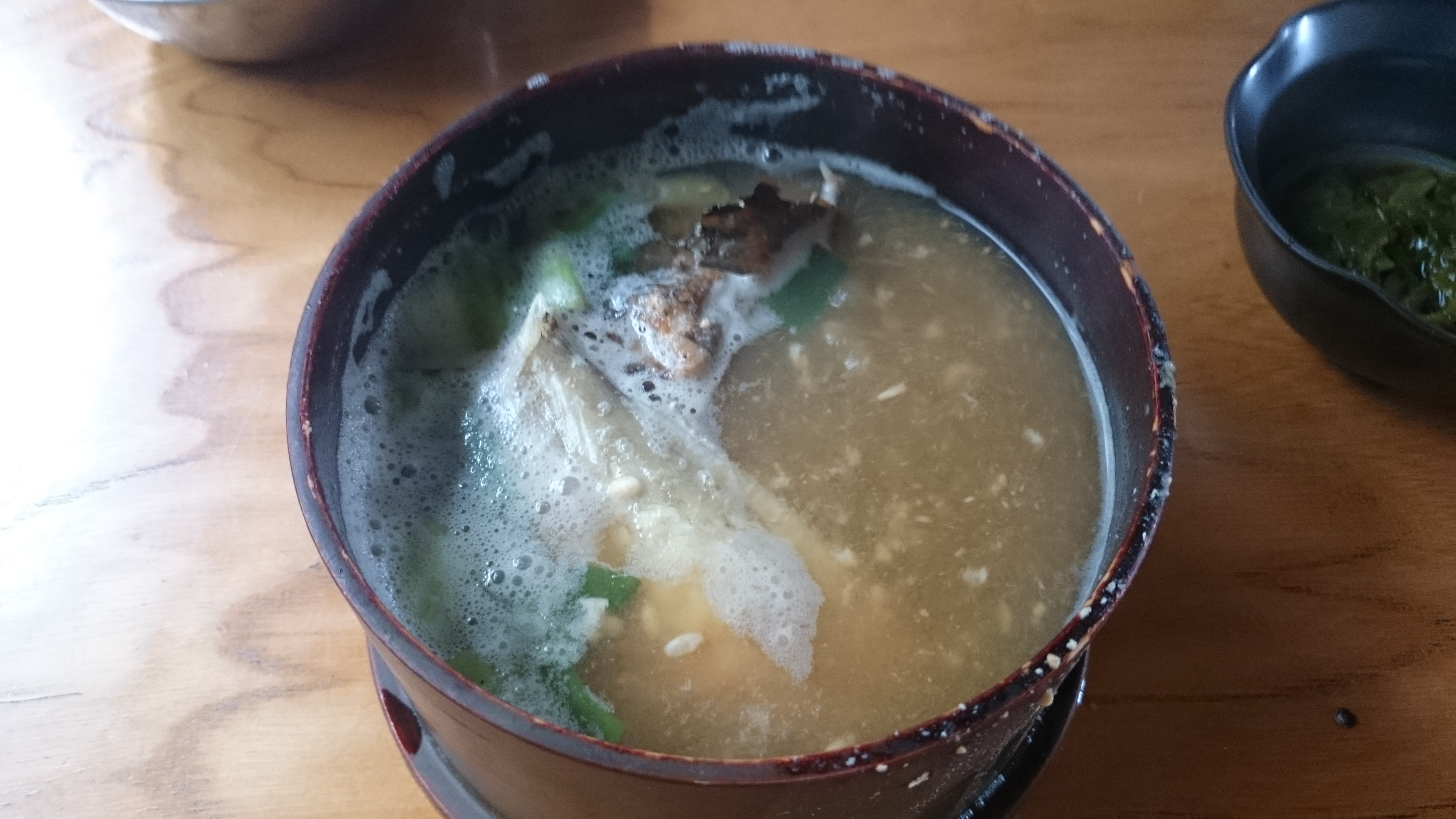 粟島名物のわっぱ煮